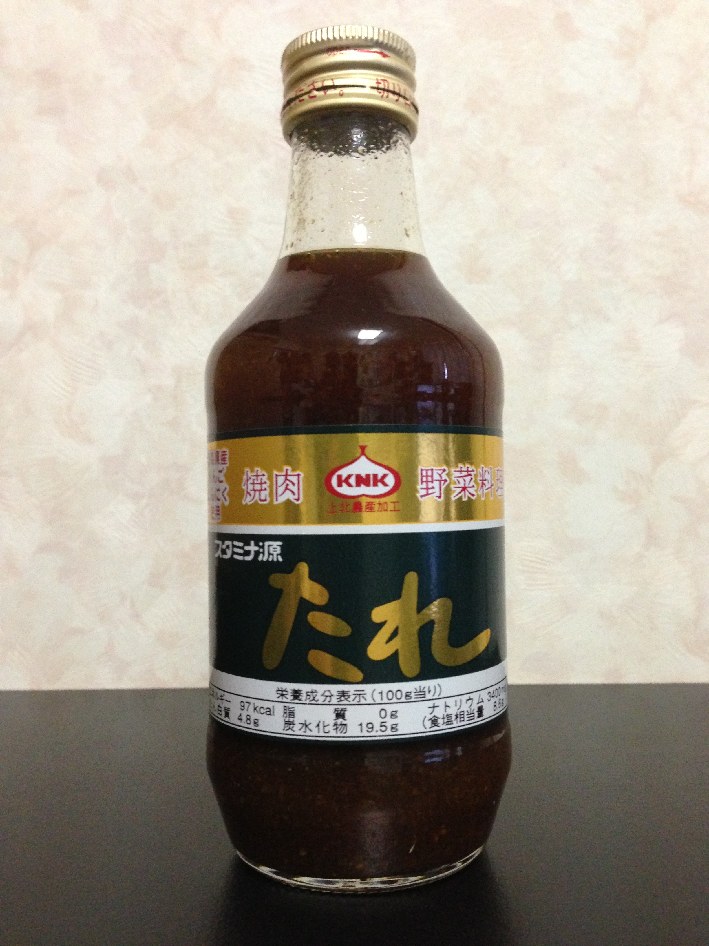 スタミナ源たれ（300g瓶） - 上北農産加工農業協同組合